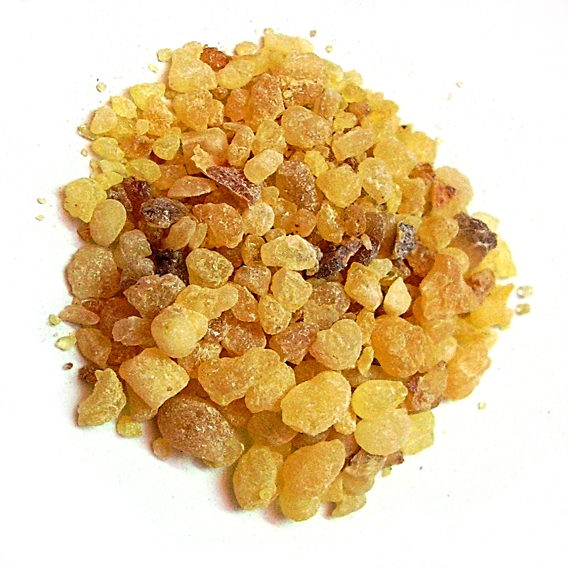 Olibanum resin